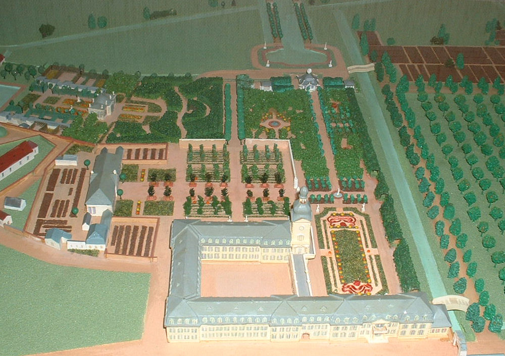 Modell des ehemaligen Schlosses von Oggersheim im Stadtmuseum der Stadt Ludwigshafen am Rhein